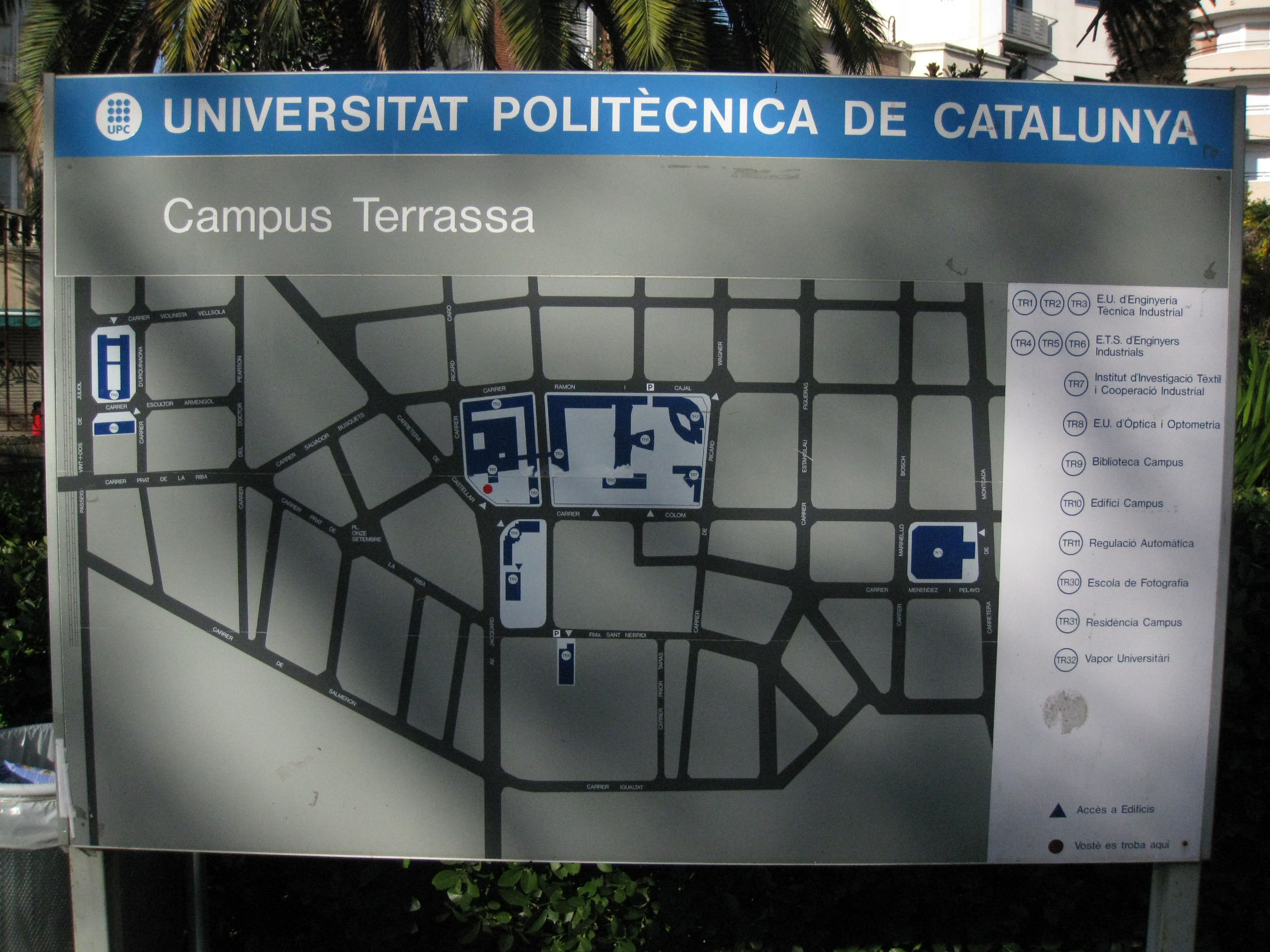 Plànol del Campus de la UPC a Terrassa, dins el recinte de l'Escola Industrial.